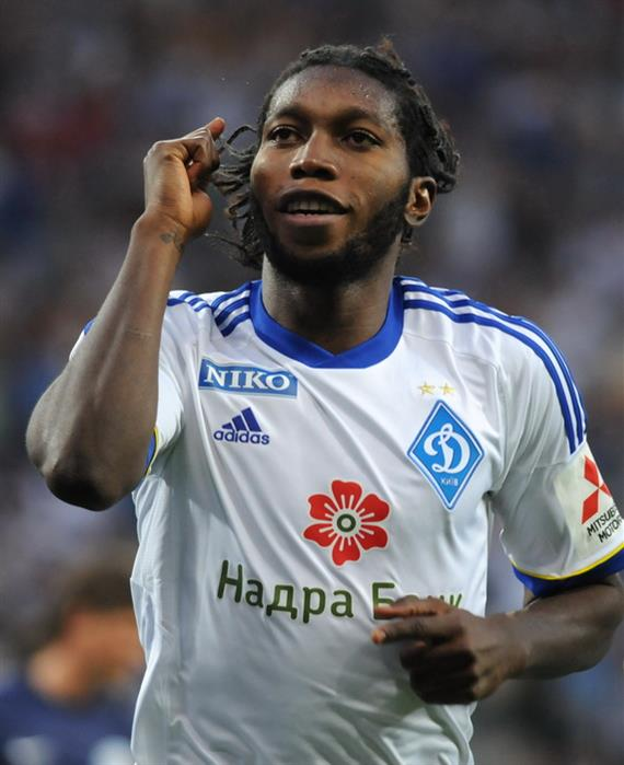 Динамо 2:0 Севастополь